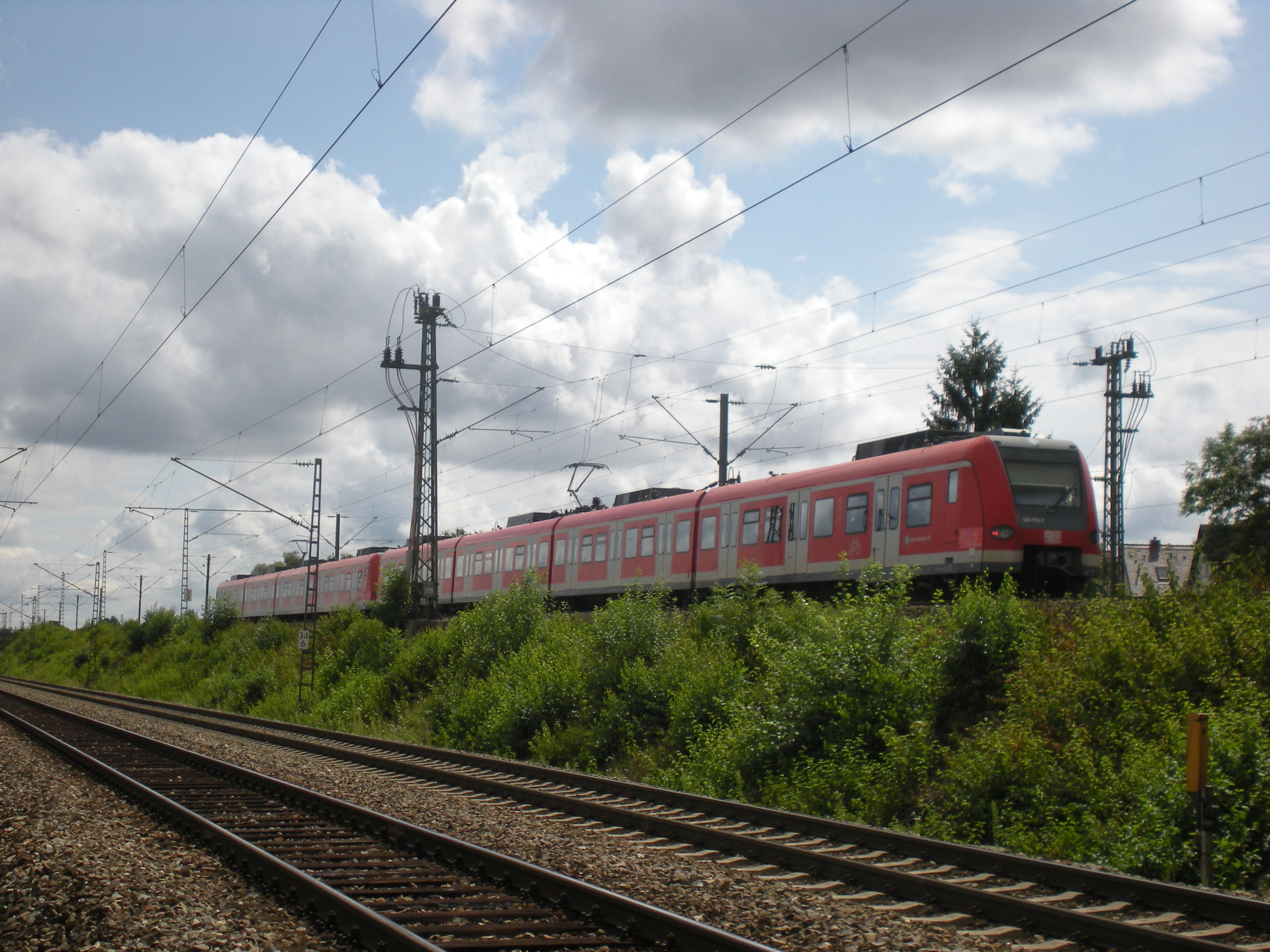 Zug der Münchner S-Bahnlinie S4 mit Baureihe 423 auf der Bahnstrecke München–Rosenheim zwischen Trudering und Gronsdorf